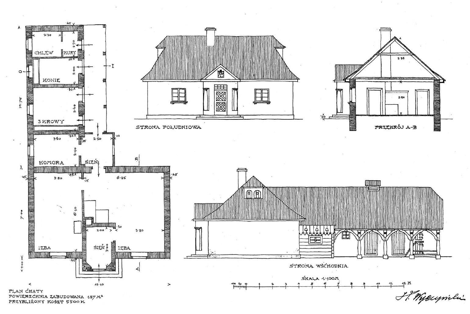 Типовий проект двокімнатної хати з коморою, сіньми, стайнею, і хлівом. Опублікований 1915 року в альбомі «Odbudowa polskiej wsi». Автор Казімеж Вичинський (1876—1923).